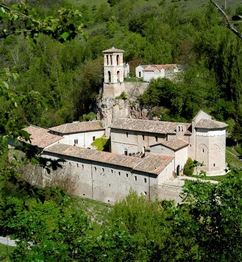 Abbazia di Sant'Eutizio immersa nel verde della Valcostoriana